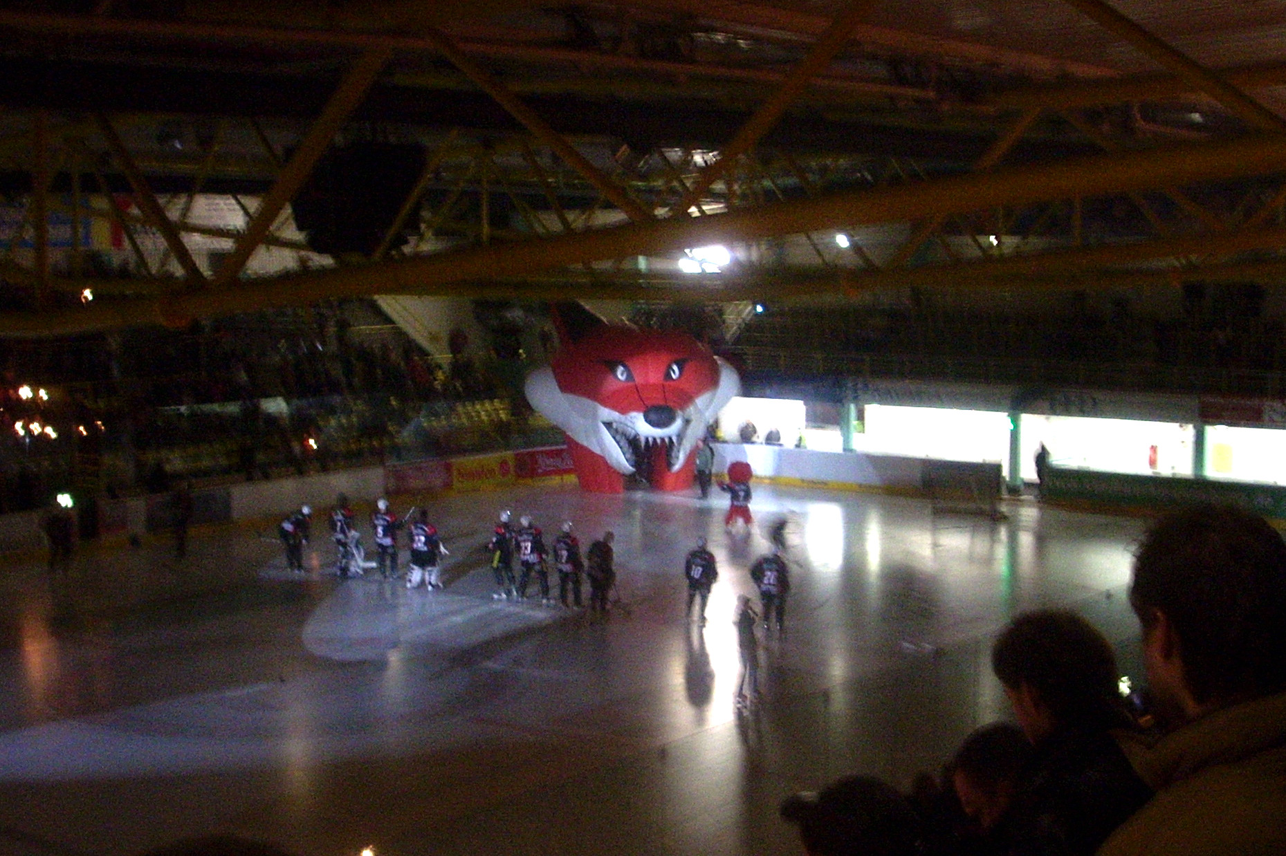 Einlauf der Mannschaft der Duisburger Füchse vor dem DEL- Spiel gegen die Augsburger Panther am 27. Januar 2008